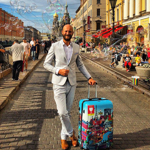 Проведение мероприятий в любой точке мира